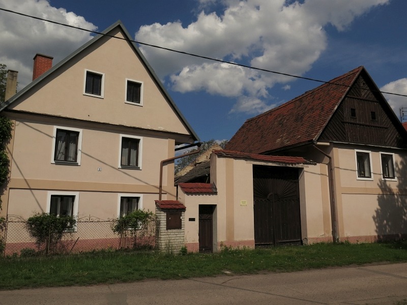 Usedlost čp. 2, Počeplice 2, Počeplice.